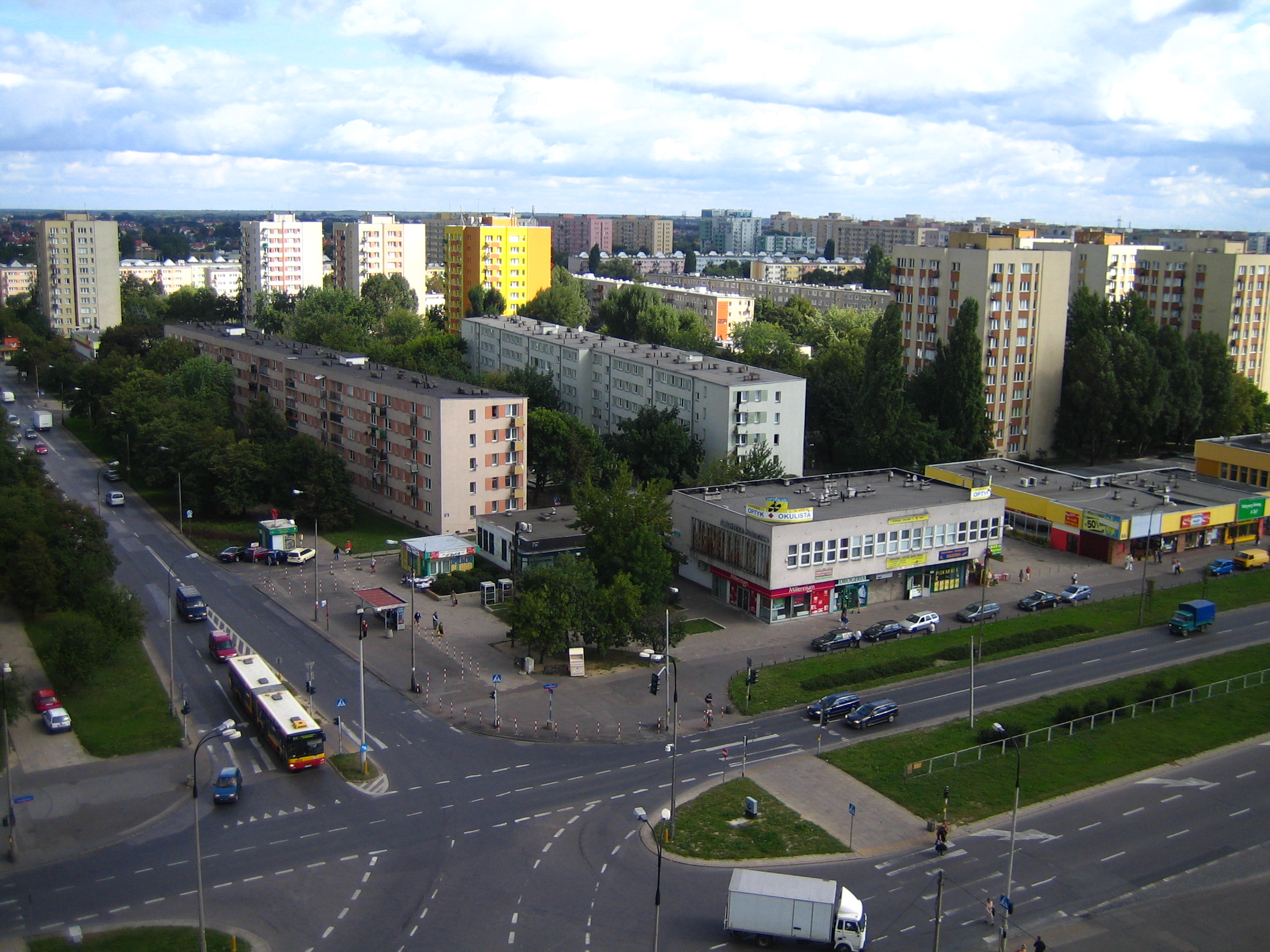 Warszawa - widok na Bródno